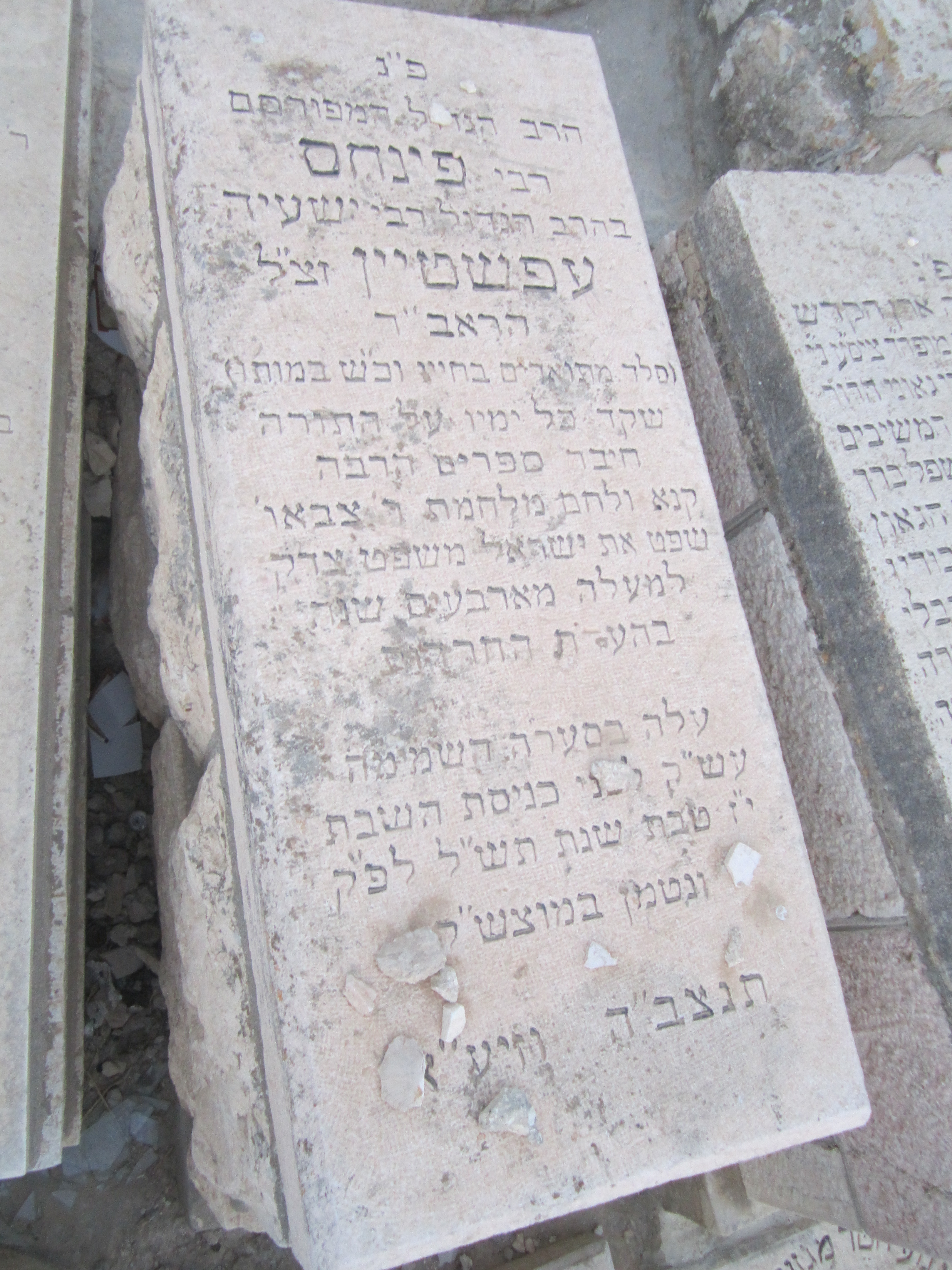 קבר הרב פנחס אפשטיין בהר הזיתים ירושלים